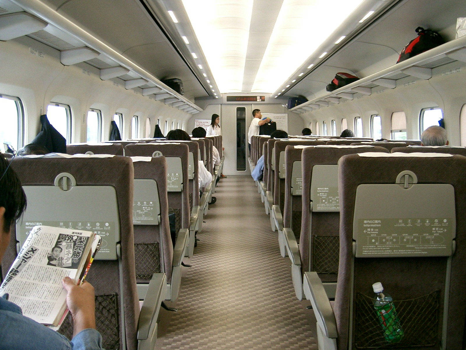 Das Innere eines Shinkansen Zuges